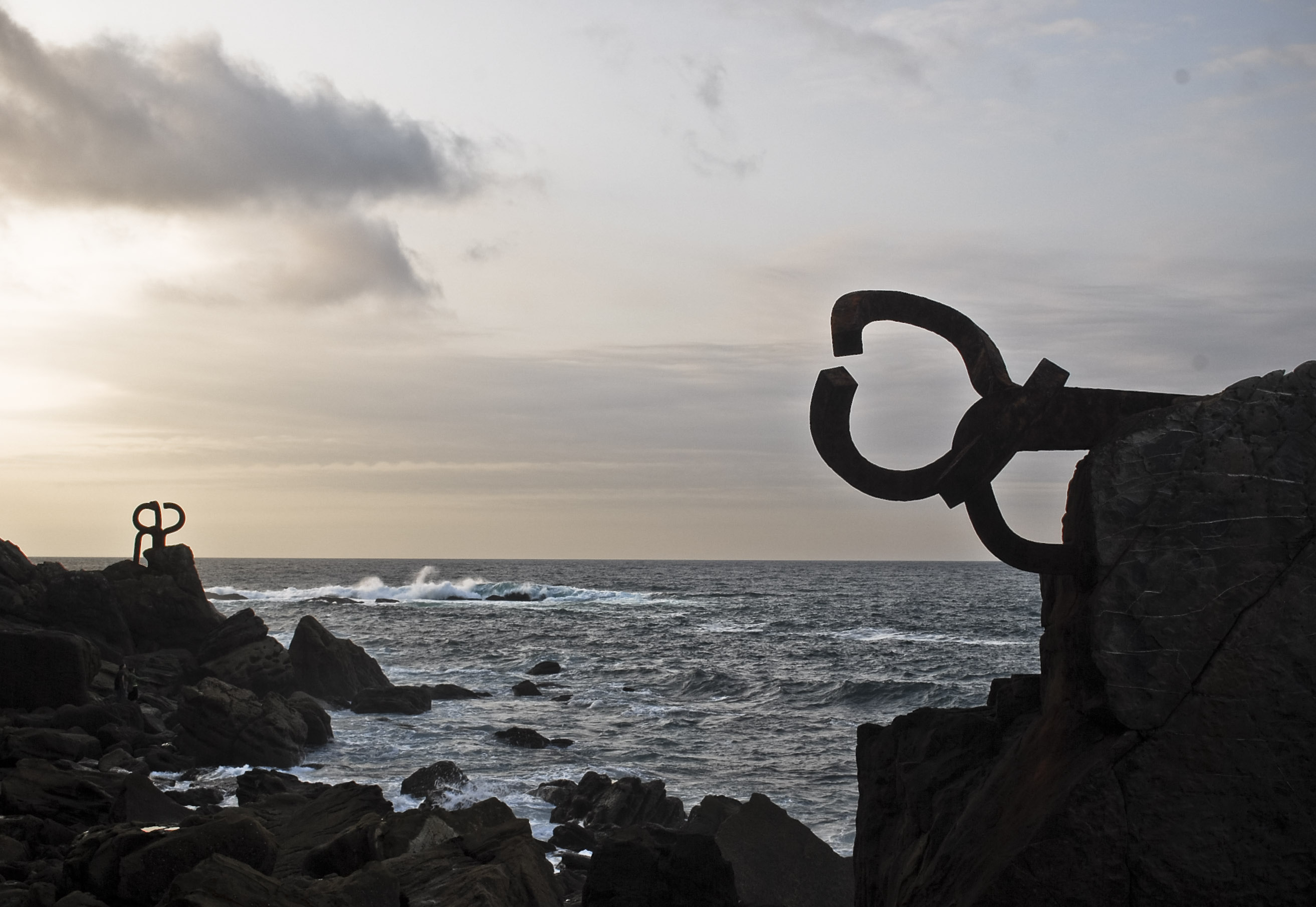 El Peine de los Vientos, 2008.